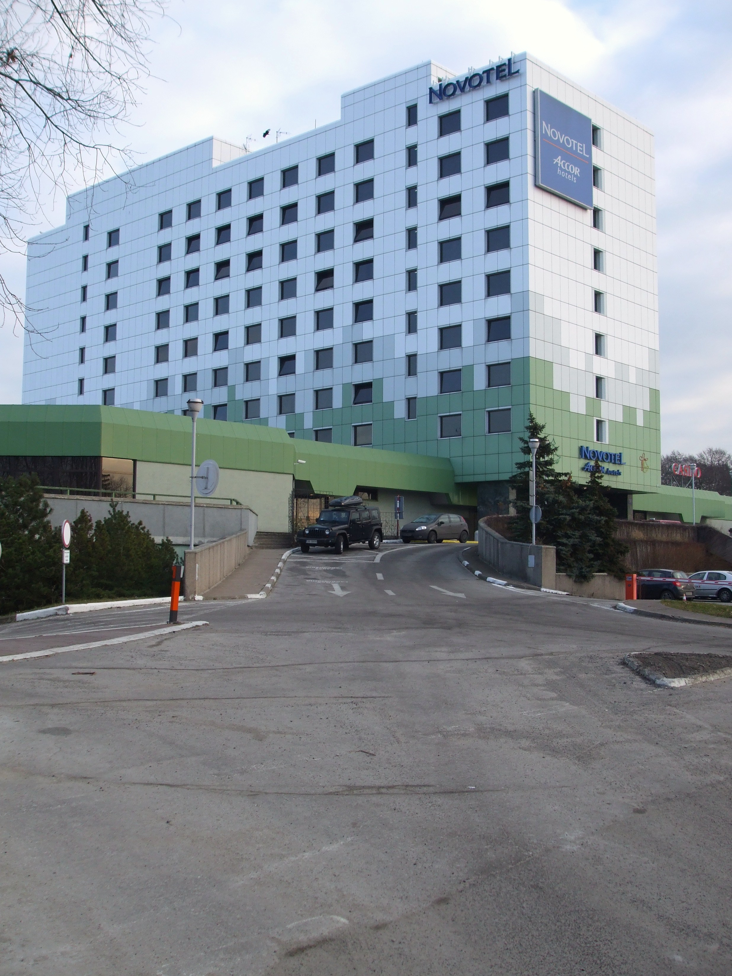 Gdańsk Jelitkowo, hotel Novotel.